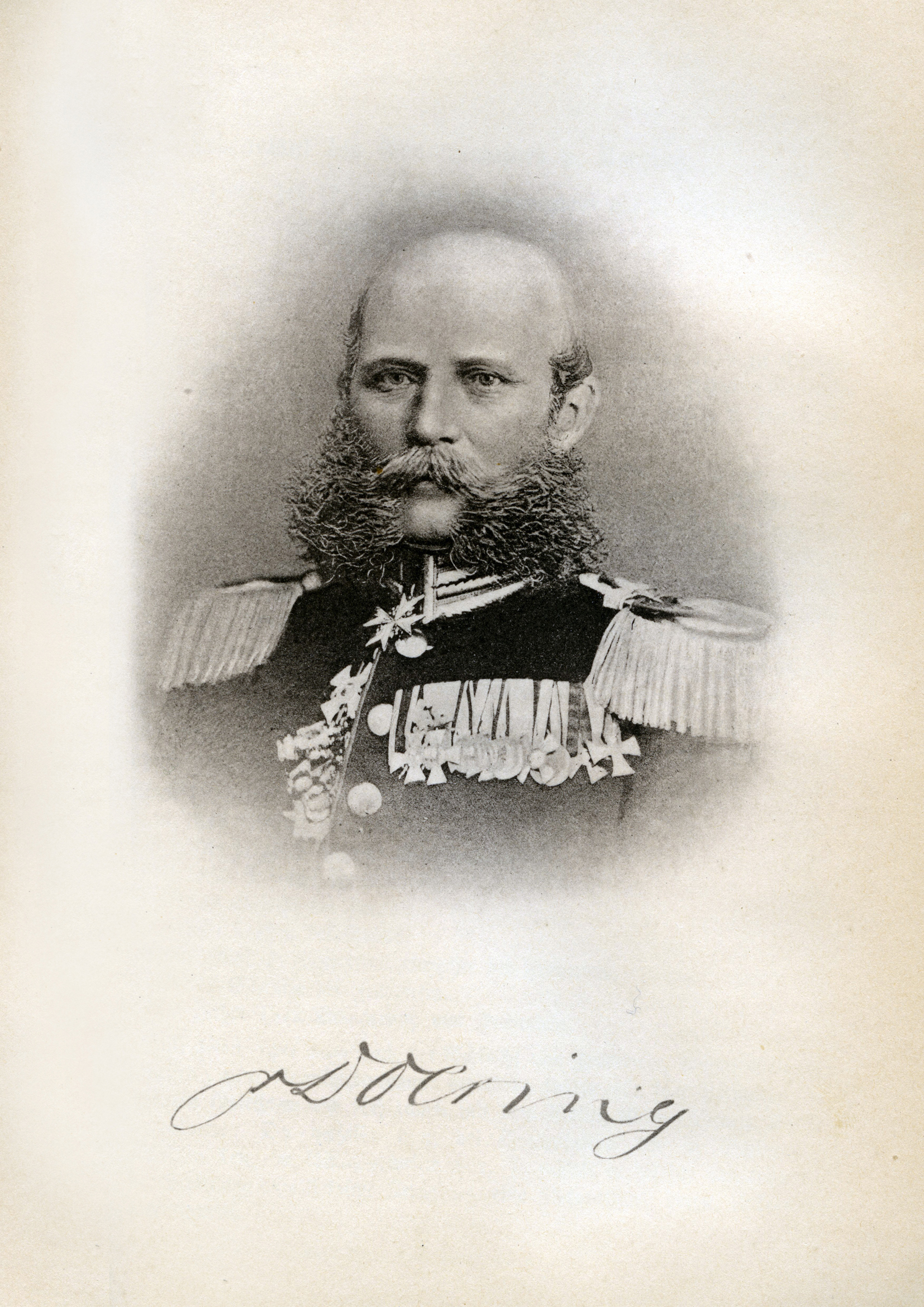 Licht-Druck, Karl Gustav Alfred Wilhelm von Doering (* 3. September 1819 in Königsberg; † 16. August 1870 bei Vionville) in der Uniform des Königin Elisabeth Garde-Grenadier-Regiments Nr. 3 und seiner Signatur aus Constantin von Altrocks Buch, 1897